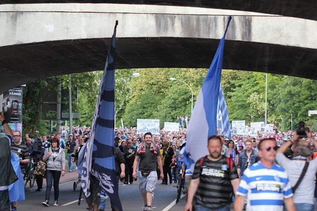 MSV Lizenzentzug 2013. Fan-Marsch mit kanpp 6000 Teilnehmern am 4. Juni 2013. Hier: im berüchtigten Duisburger Tunnel...